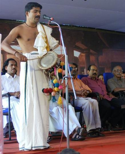 ഞെരളത്ത് ഹരിഗോവിന്ദൻ